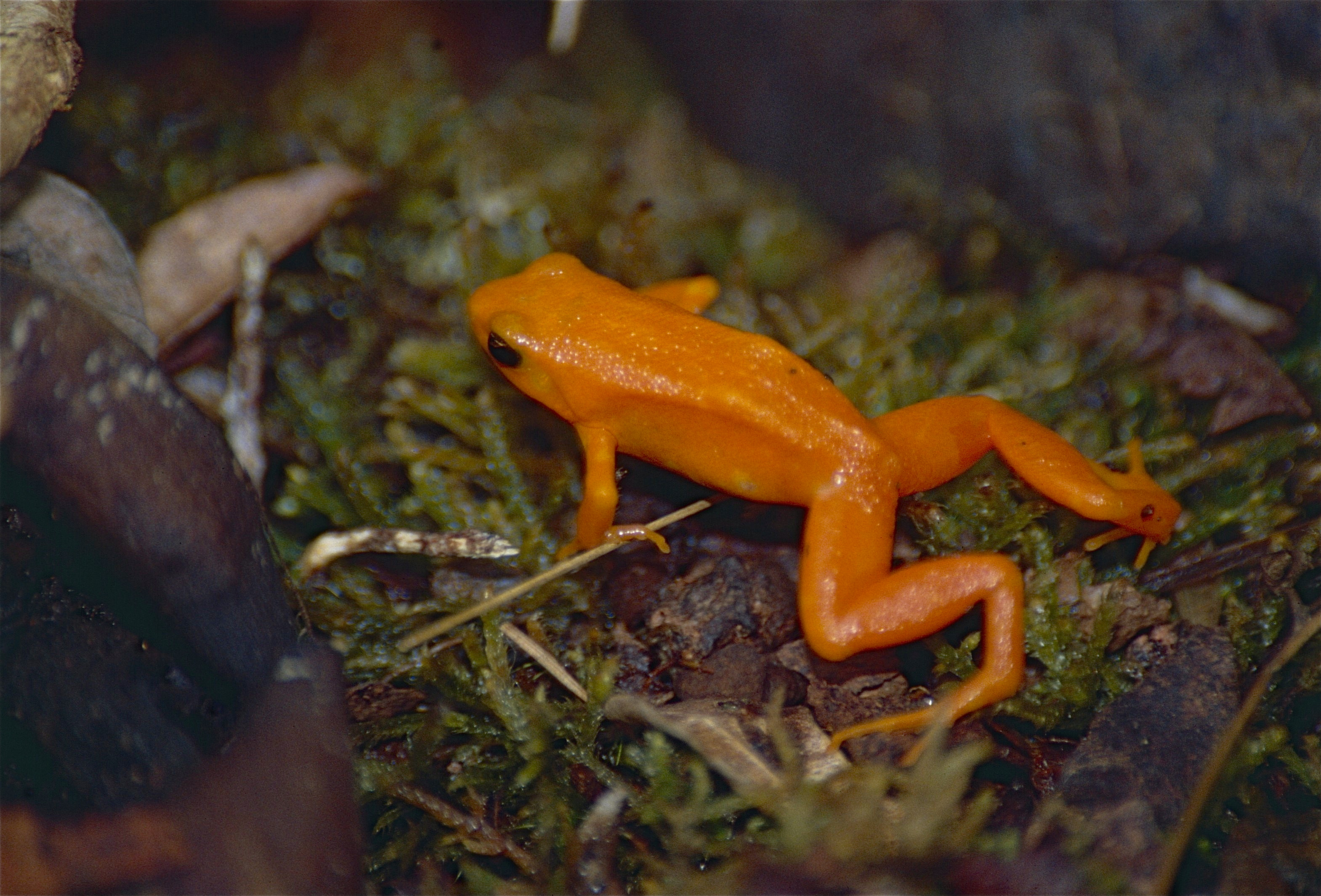 Réserve Peyrieras, Moramanga, MADAGASCAR